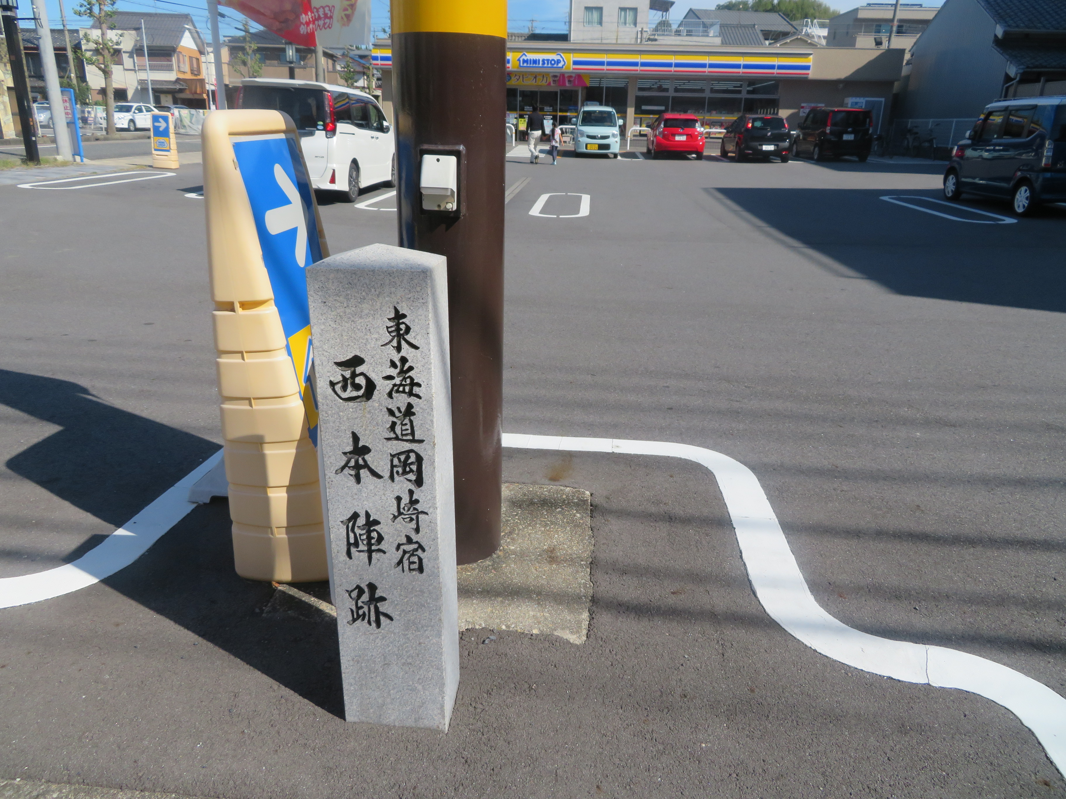 岡崎市伝馬通。東海道岡崎宿、西本陣跡。岡崎グランド劇場がなくなったあとミニストップが建てられた。